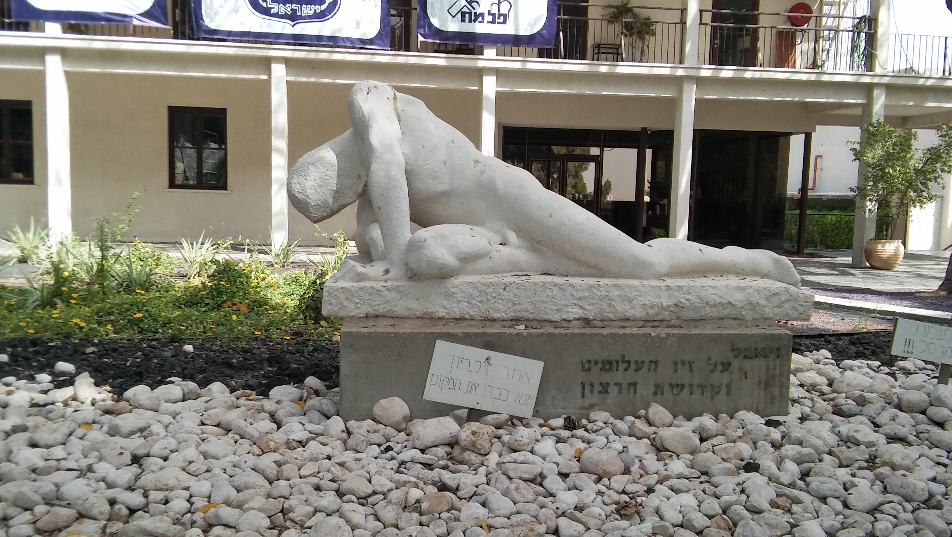 בית סרני גבעת ברנר - פסל חזית